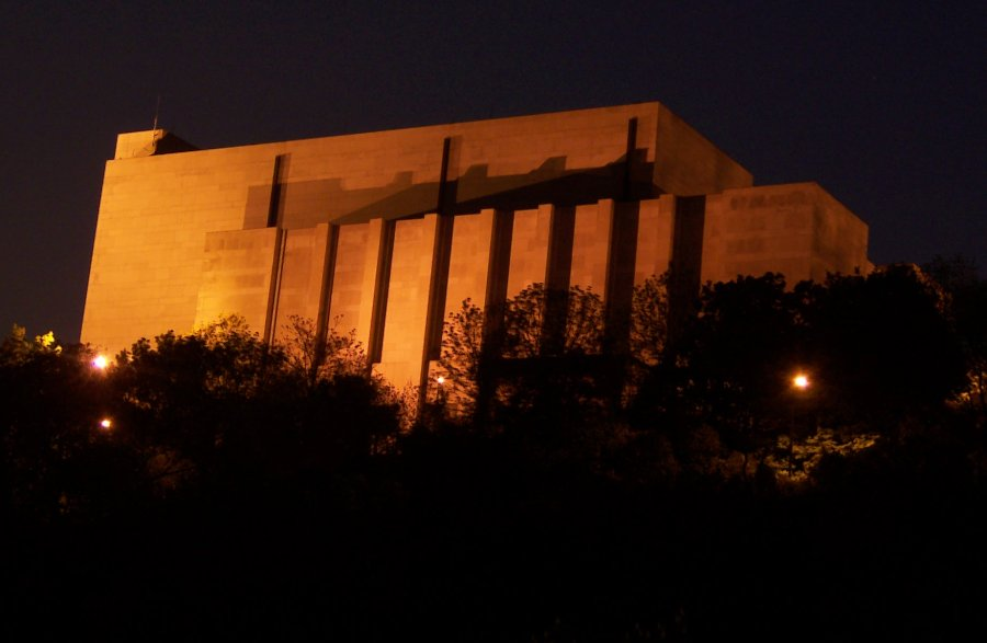 Památník na Vítkově v noci. Foceno z komína Husitská 55, Žižkov LT 25/UB. Použitý fotoaparát: KODAK DX6440, Expozice 4s.